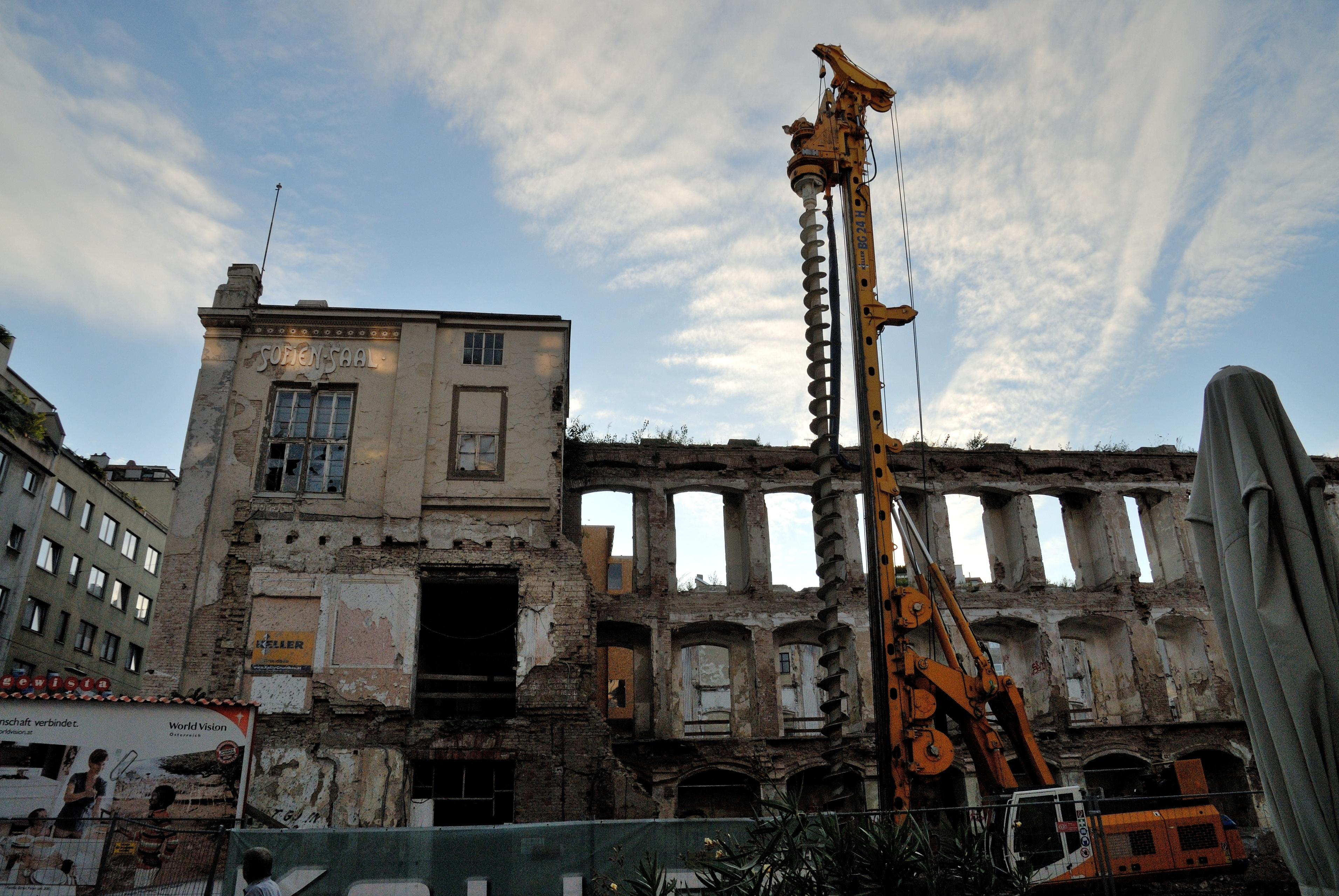 Sophiensäle, ehem. Sophienbad